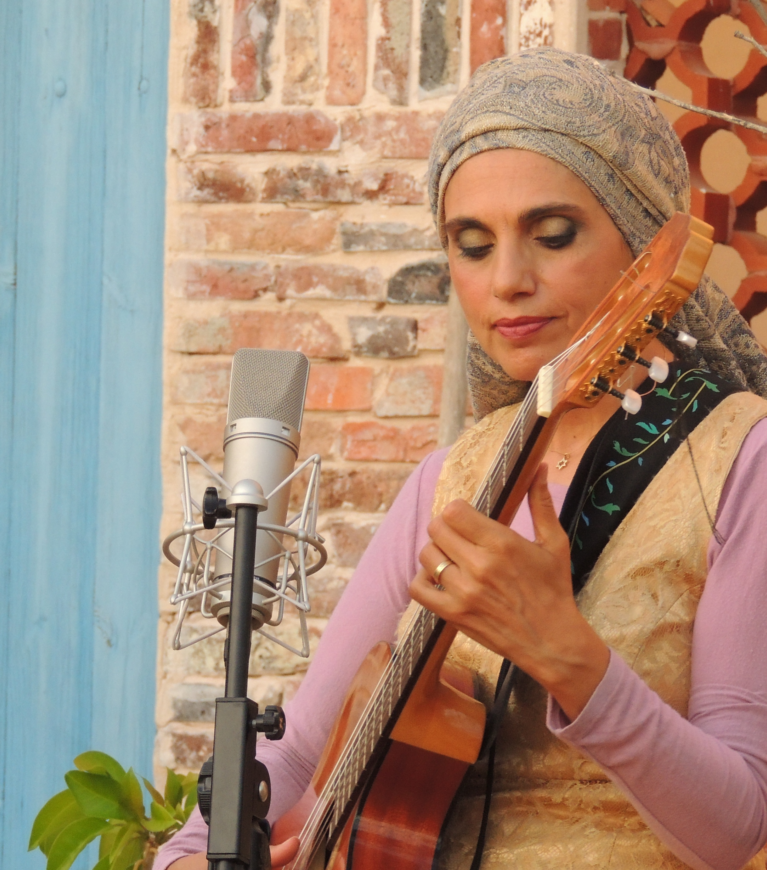 זמרת ישראלית - אתי אנקרי